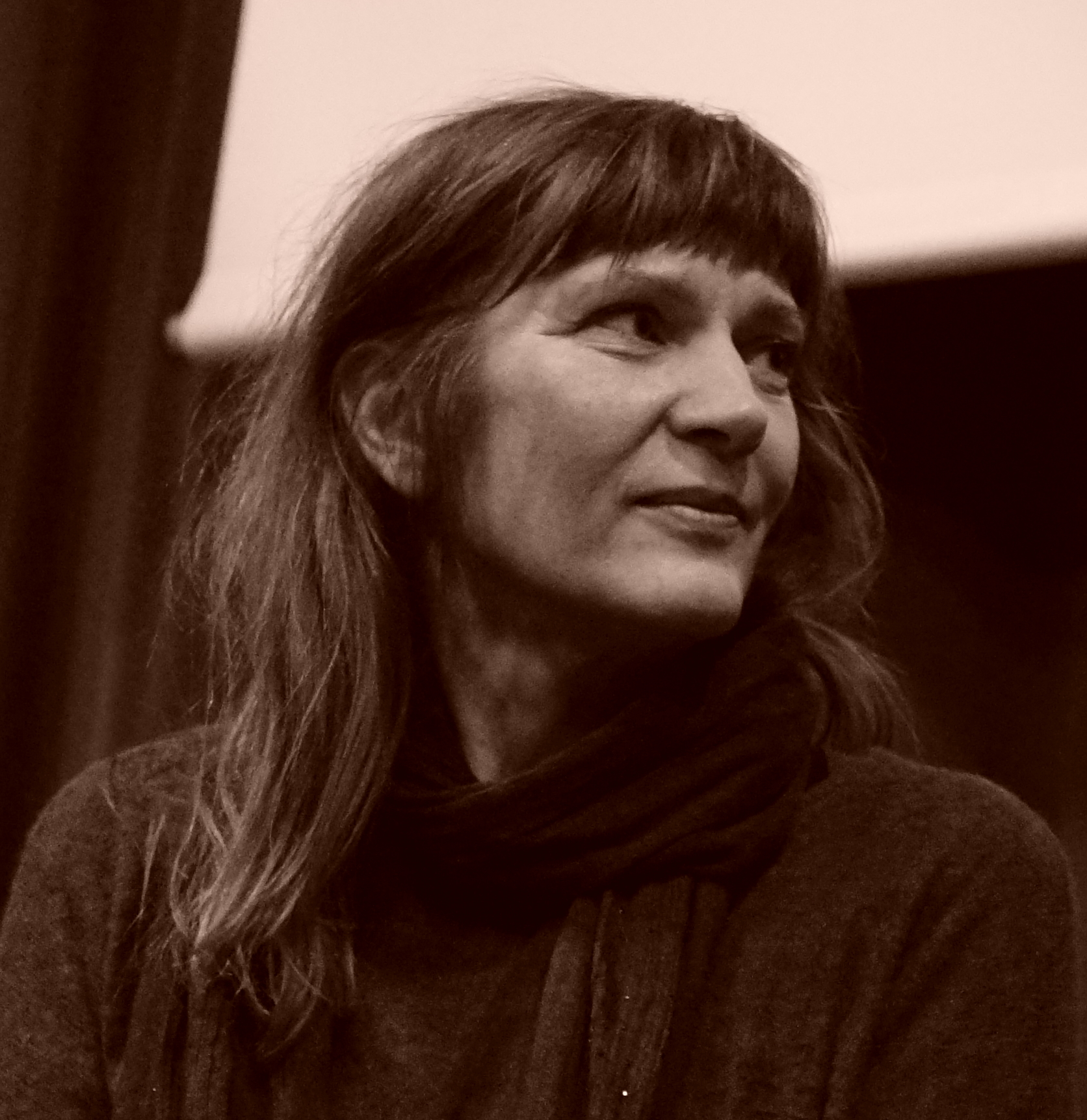 lors de Reims scènes d’Europe 2017, présentation de No land's song à la Cartonnerie.